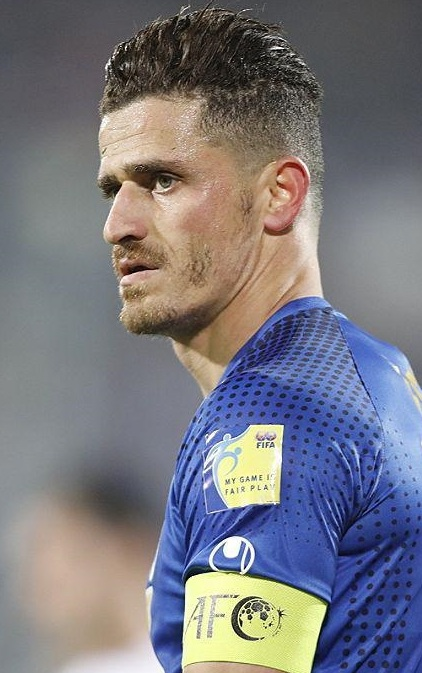 تیم فوتبال استقلال در دیدار هفته پانزدهم رقابت‌های لیگ برتر از ساعت ۱۷:۳۰ شنبه، ۲۳ آذر ۱۳۹۸ در ورزشگاه آزادی میزبان شاهین شهرداری بوشهر بود و با نتیجه ۴ بر یک به برتری رسید. گل‌های استقلال را در این بازی آرش رضاوند (۲۹)، مهدی قائدی (۵۲)، محمد دانشگر (۵۸) و شیخ دیاباته (۶۹) به ثمر رساندند و روزبه چشمی (۸۸ - گل به خودی) برای شاهین گلزنی کرد. (مشاهده گزارش بازی)